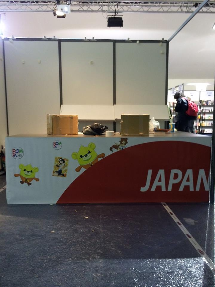 アングレーム漫画祭にて、主催者に展示物を強制撤去された後の日本ブース。